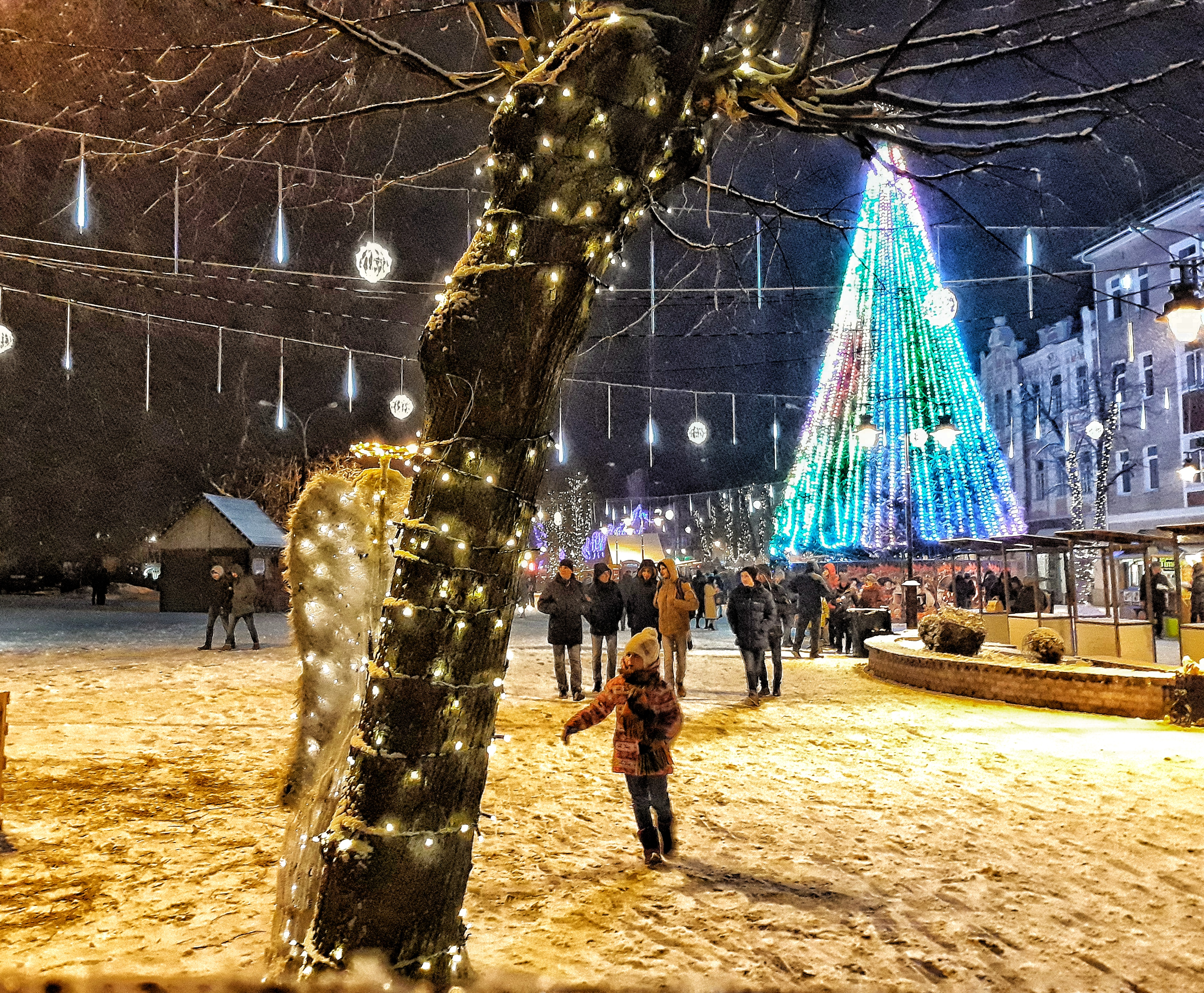 23 грудня 2017 року у Хмельницькому випав снігопад, який до ранку вже розтанув. А на Різдвяному ярмарку панувала така атмосфера)) Автор - Василь Камінський